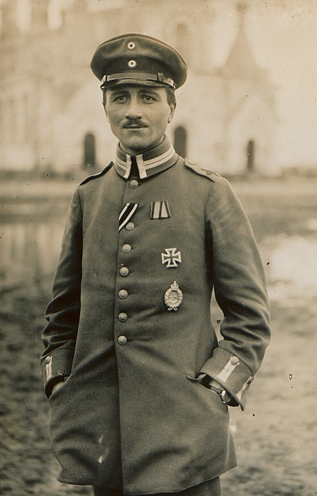 Der deutsche Militärflieger Alfred Friedrich